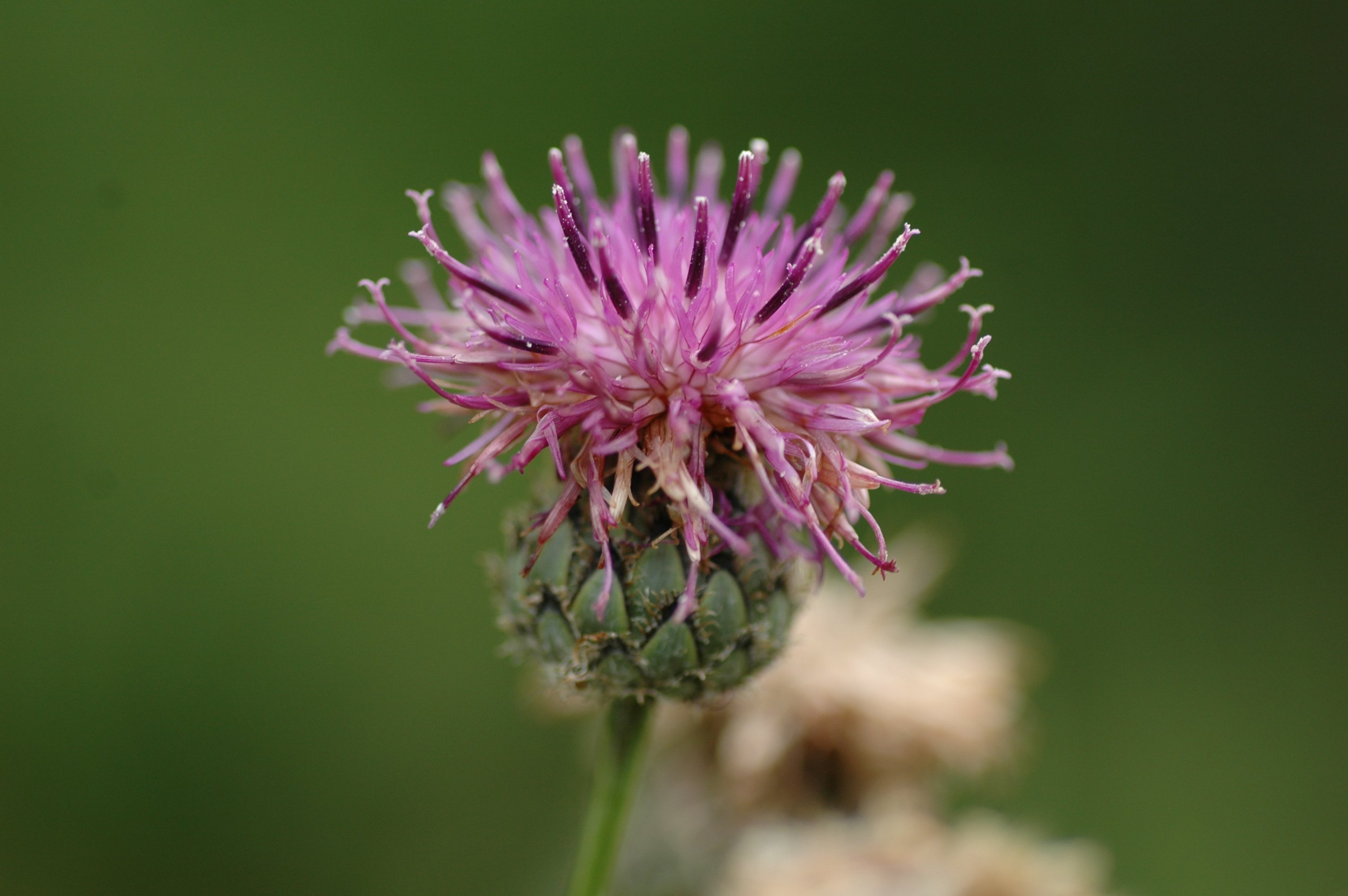 Skandiosa Flockenblume